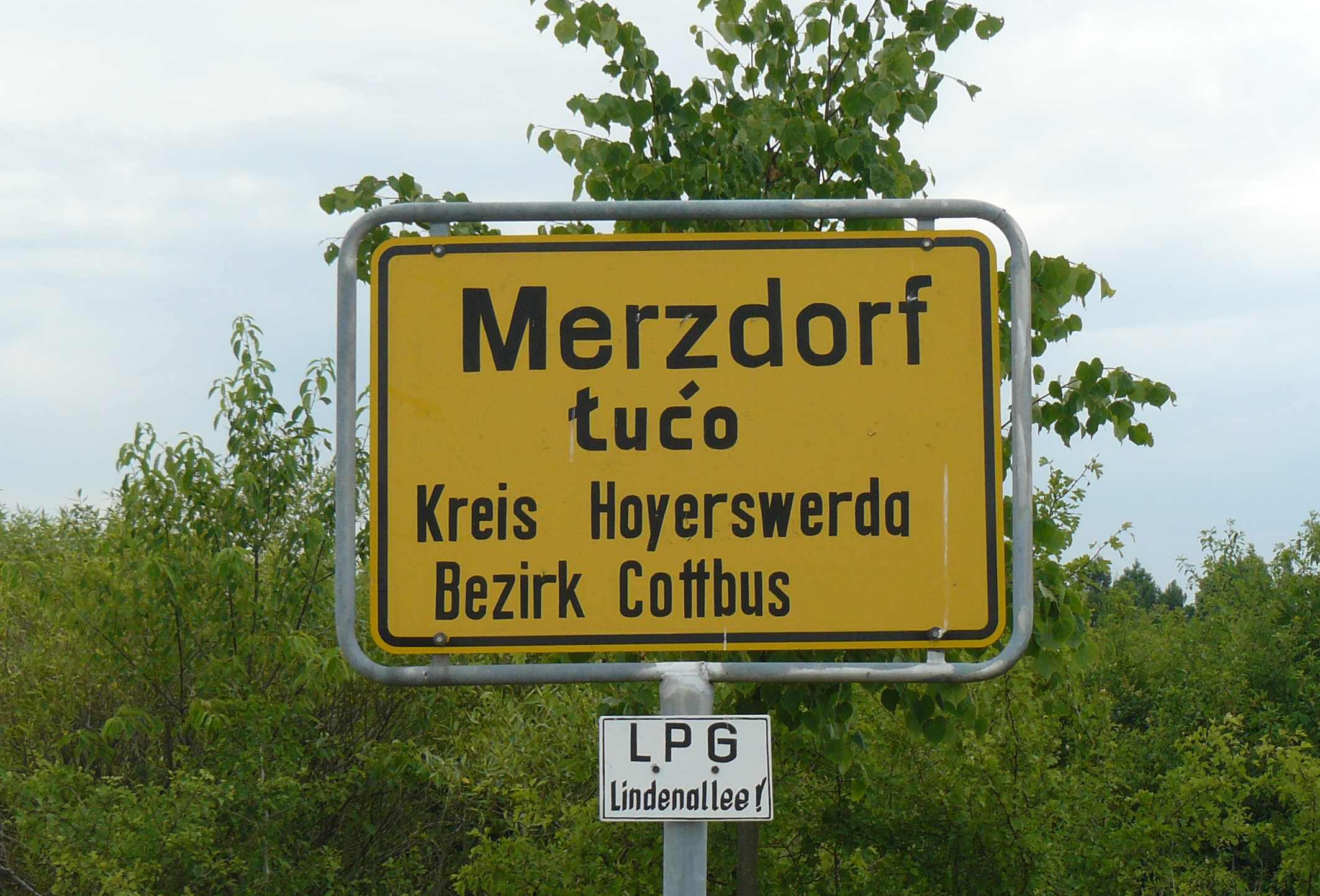 Ortseingangsschild von Merzdorf (bei Uhyst)